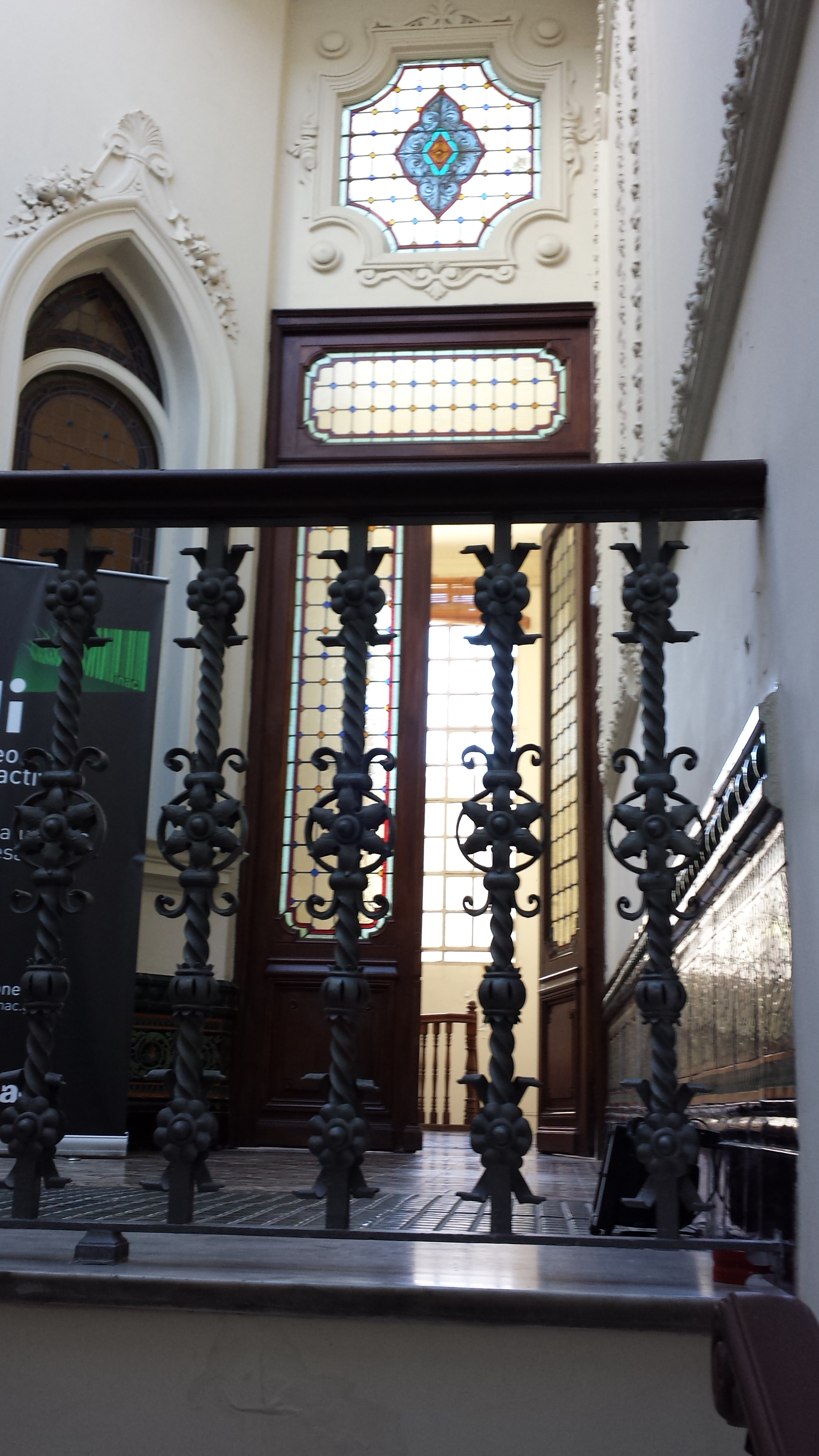 planta alta del edificio (patrimonio arquitectónico)